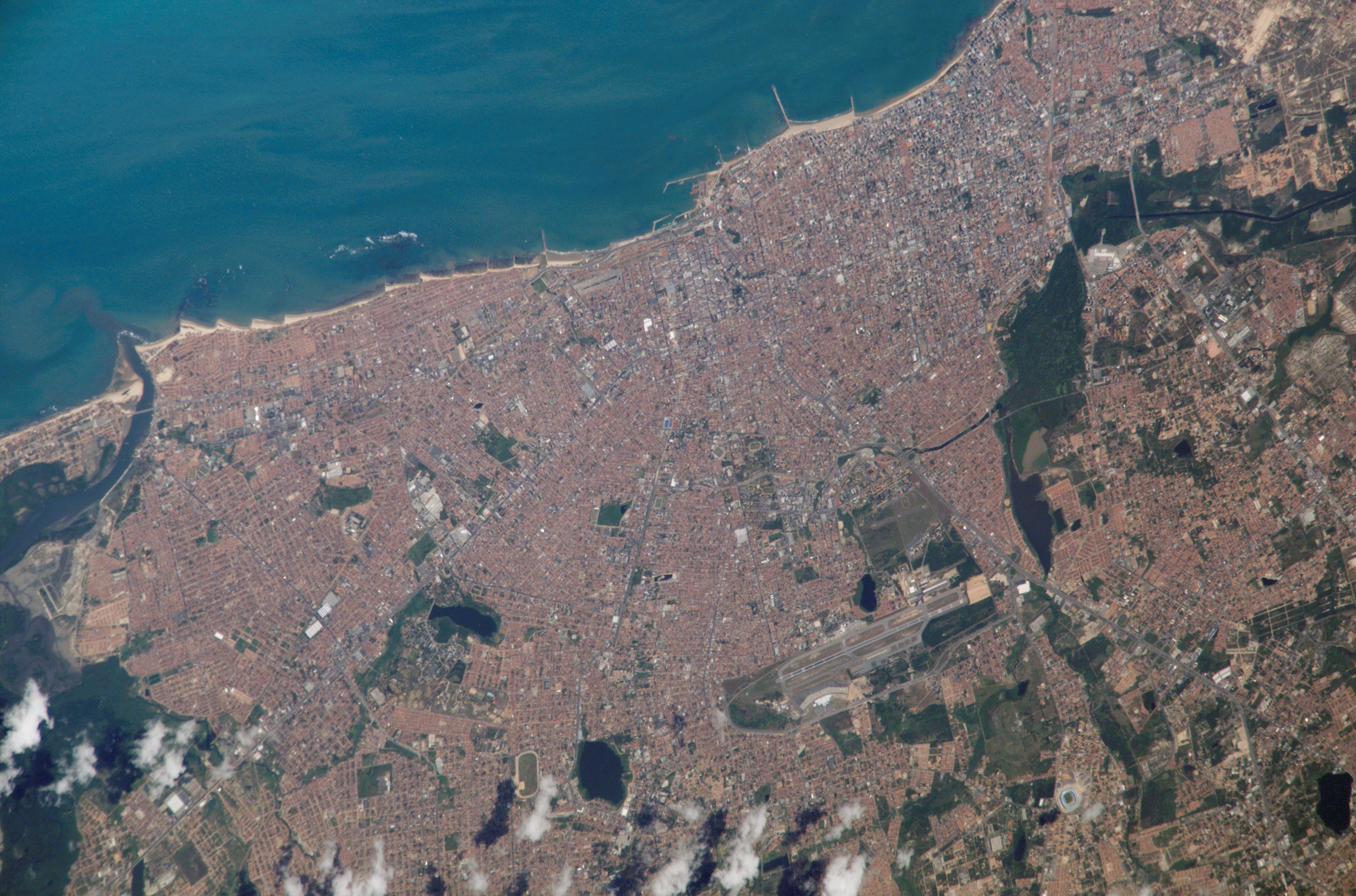 Imagem aérea do Centro da cidade de Fortaleza,bairros vizinhos e aeroporto